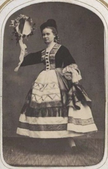 Княжна Варвара Владимировна Долгорукова (1840—1909), в замуж. Воейкова.